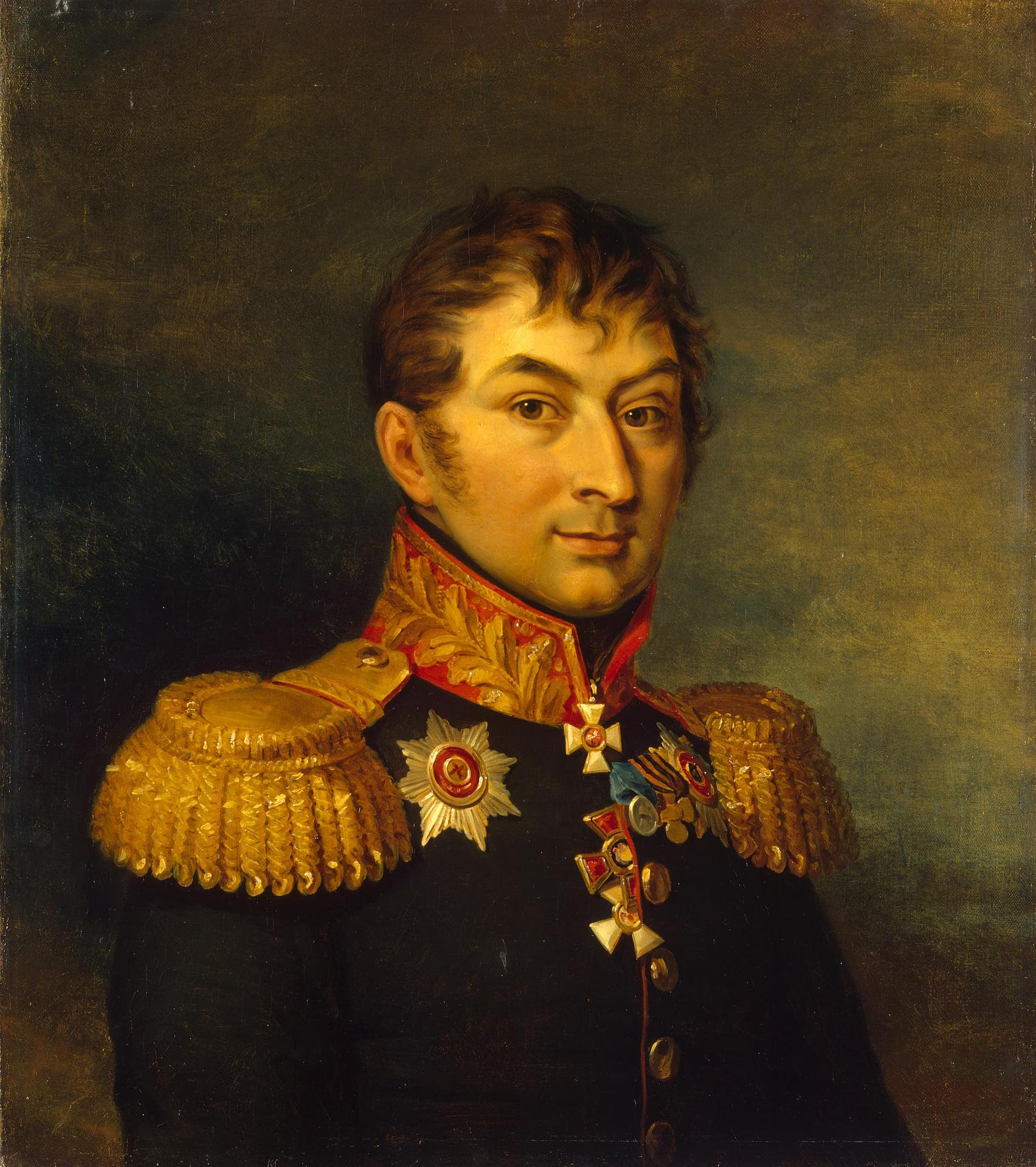 Ivan Davydovich Panchulidzev 1-st (1759 – 09.01.1815) russian general